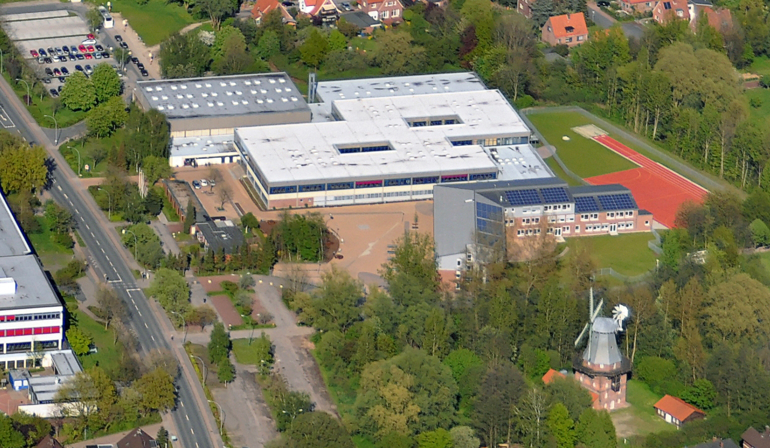 Luftbilder von der Nordseeküste 2012-05